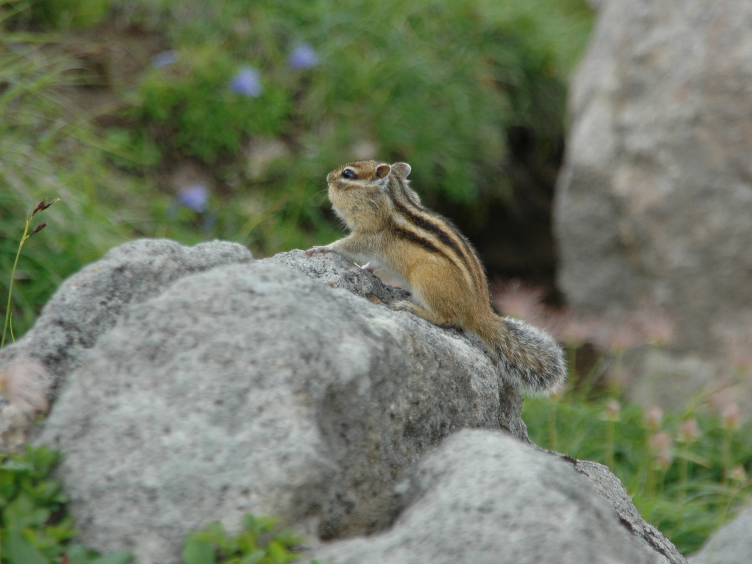 Tamias sibiricus lineatus